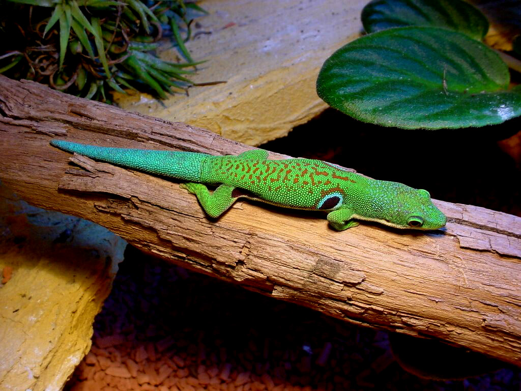 Phelsuma quadriocellata quadriocellata, Männchen, Terrarienaufnahme.